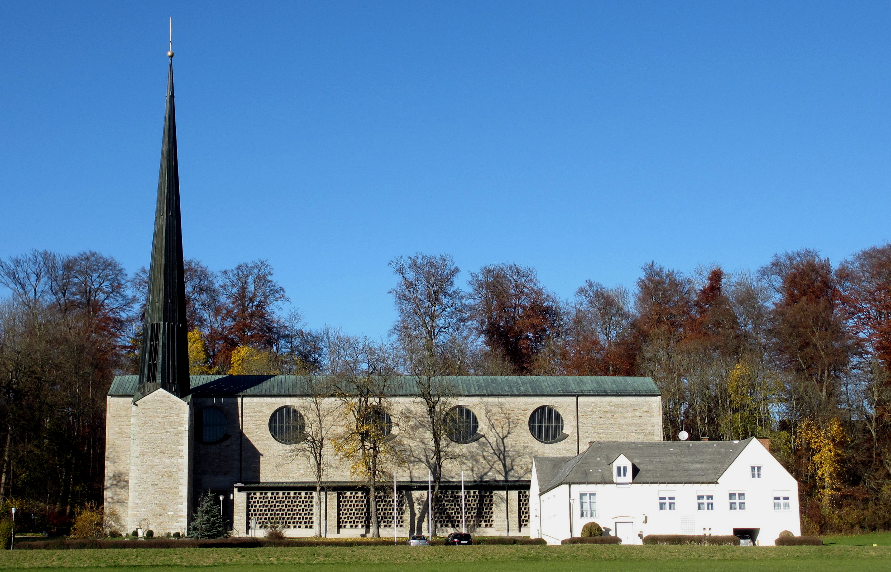 Starnberg, OT Söcking, Prinz-Karl-Straße 5, Kath. Pfarrkirche St. Ulrich. Dieses Gotteshaus ist das bisher jüngste im Starnberger Stadtgebiet. Nachdem die alte Pfarrkirche St. Stephan für die stark wachsende Gemeinde zu klein geworden war, wurde für einen Neubau ein Architektenwettbewerb ausgeschrieben, den Professor Georg Werner (TH München) gewann. Er wählte das Bauschema einer Basilika und errichtete 1957/58 dieses Gebäude mit flachem Satteldach als Doppelchoranlage. Der Turm mit spitz zulaufendem, achteckigem Helm und das Pfarrhaus sind vorgelagert. Im Inneren der Kirche beeindruckt eine Altarwand mit Schriften aus dem Johannes Evangelium von Professor Georg Brenninger. This is a photograph of an architectural monument.